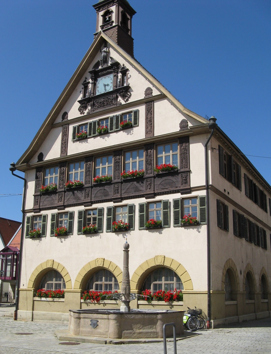 Altes Rathaus Metzingen